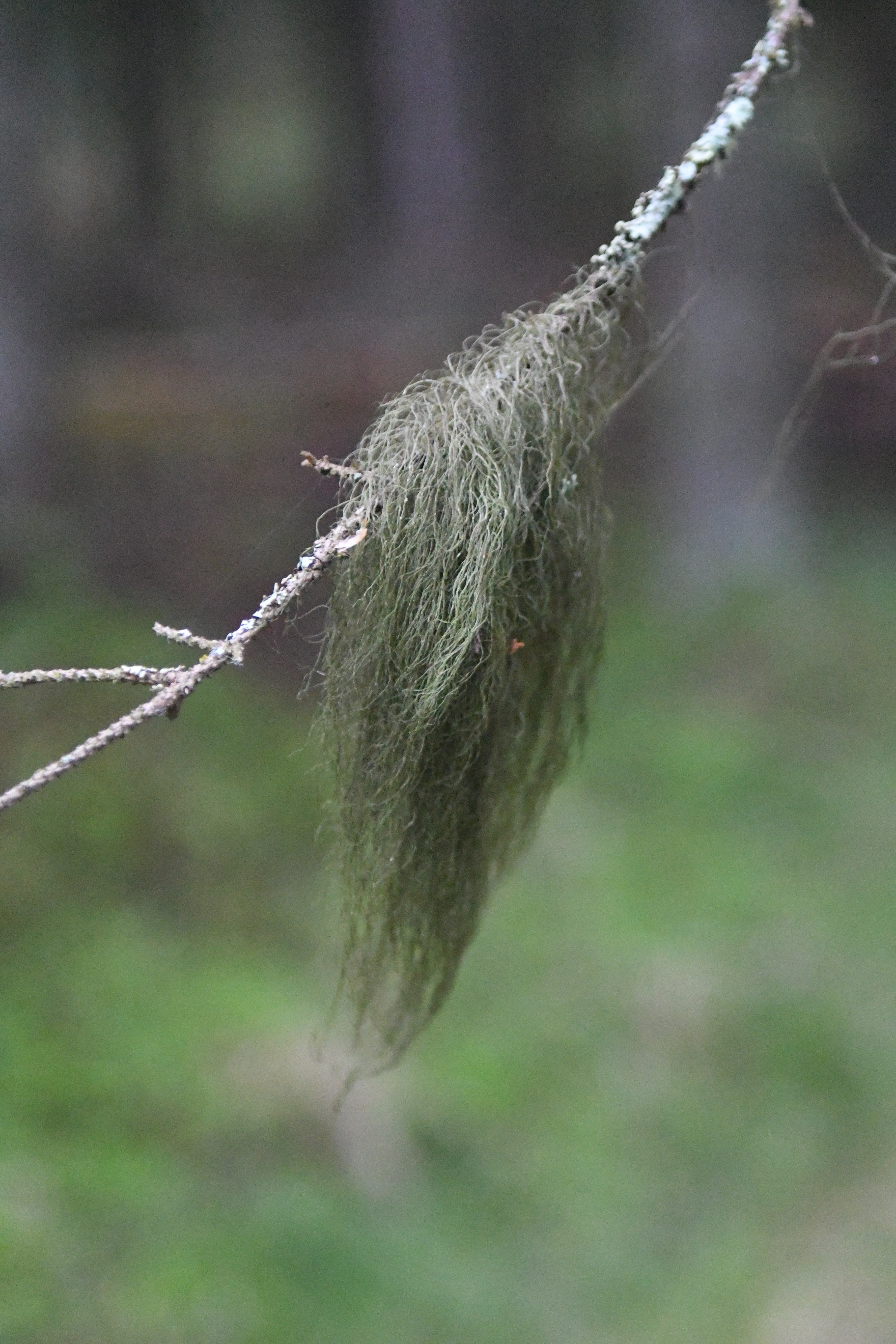 Skägglav på gren